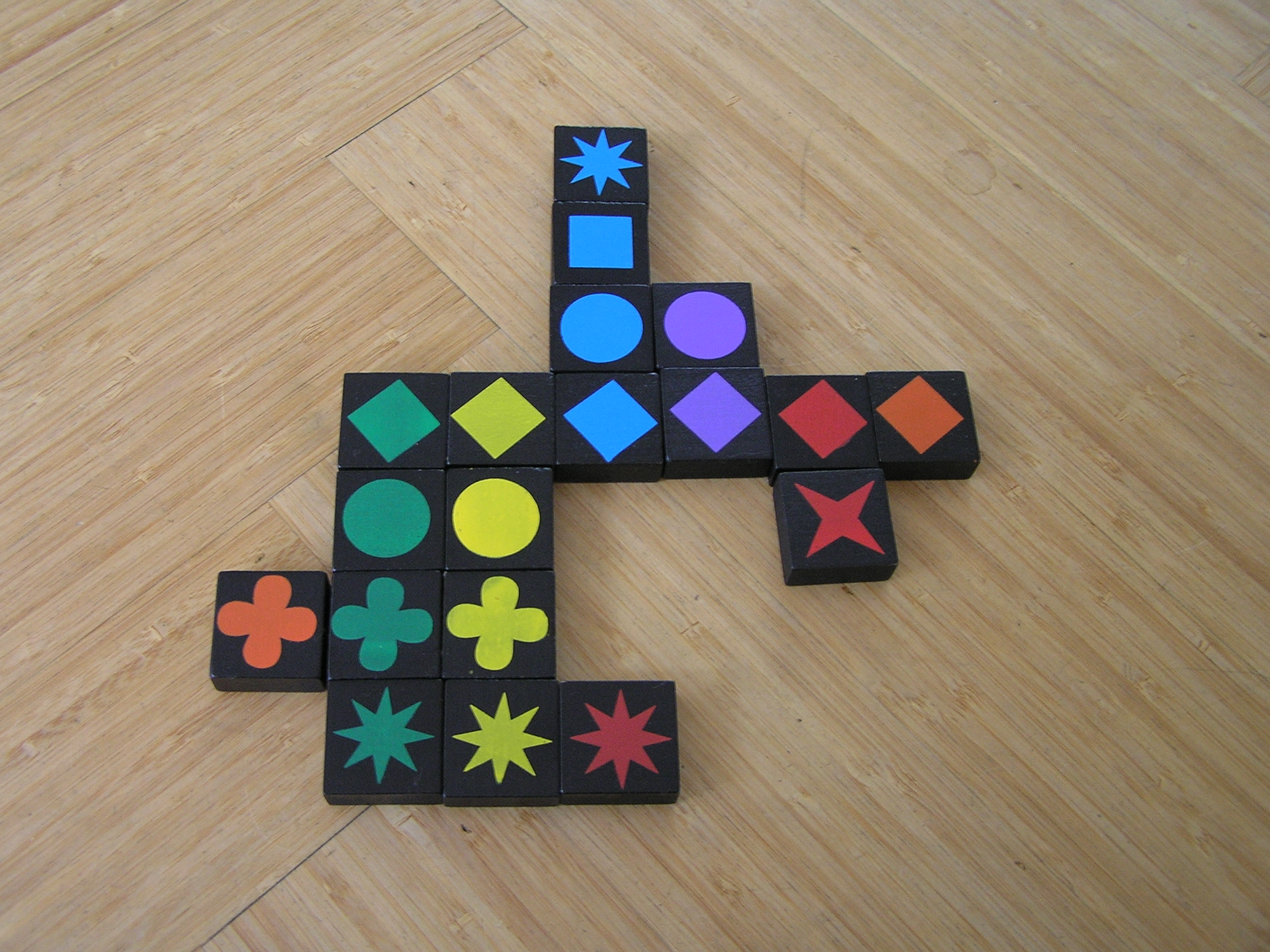 Spelpositie van Qwirkle na enkele rondjes spelen